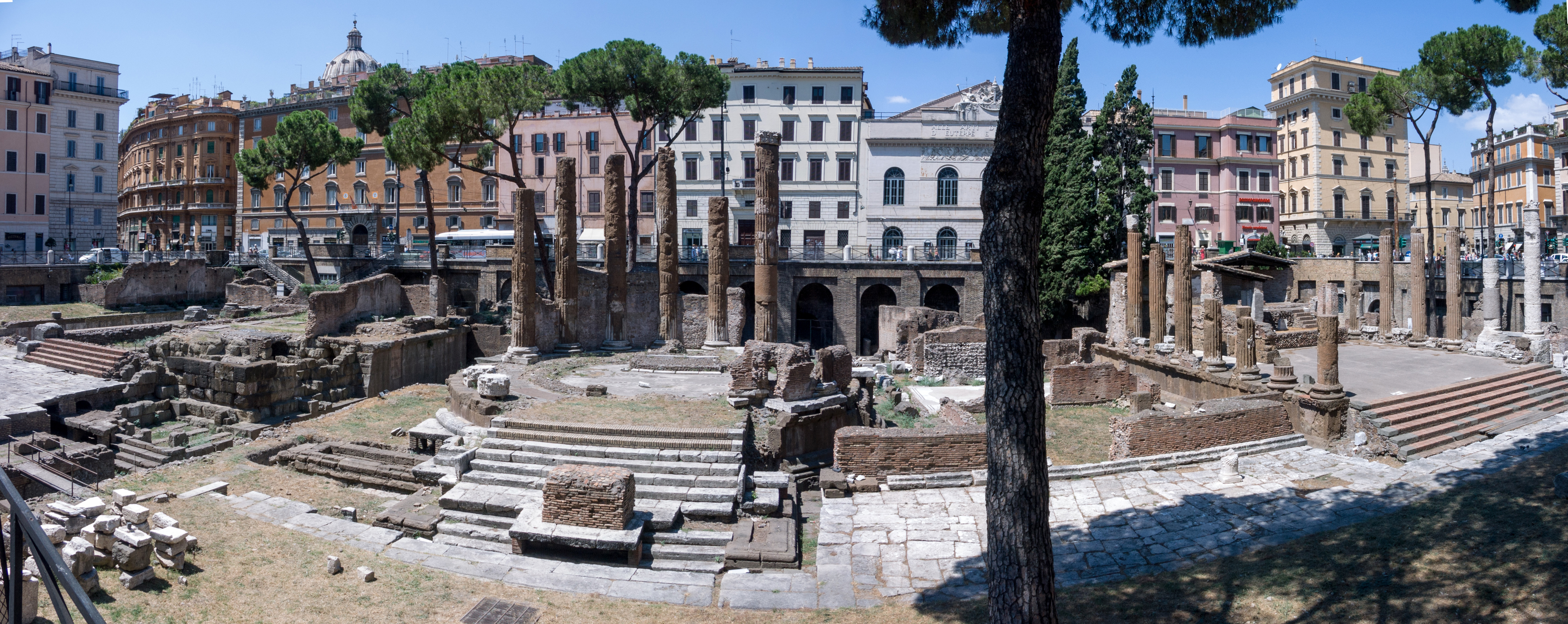 Area Sacra du Largo Argentina